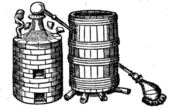 Fourneau, cucurbite, chapiteau, et tuyau de décharge passant dans un tonneau d'eau froide, Jacques Besson, 1569